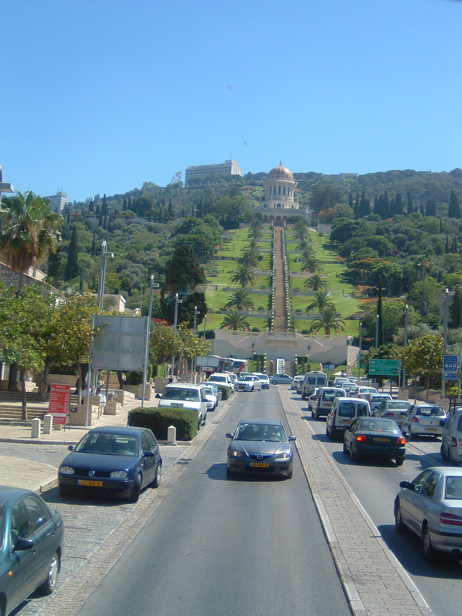 Foto scattata da me il 12 giugno 2008 Il monte Carmelo visto dal basso, sulla cima il santuario Stella Maris, a metà il sacrario Bahai